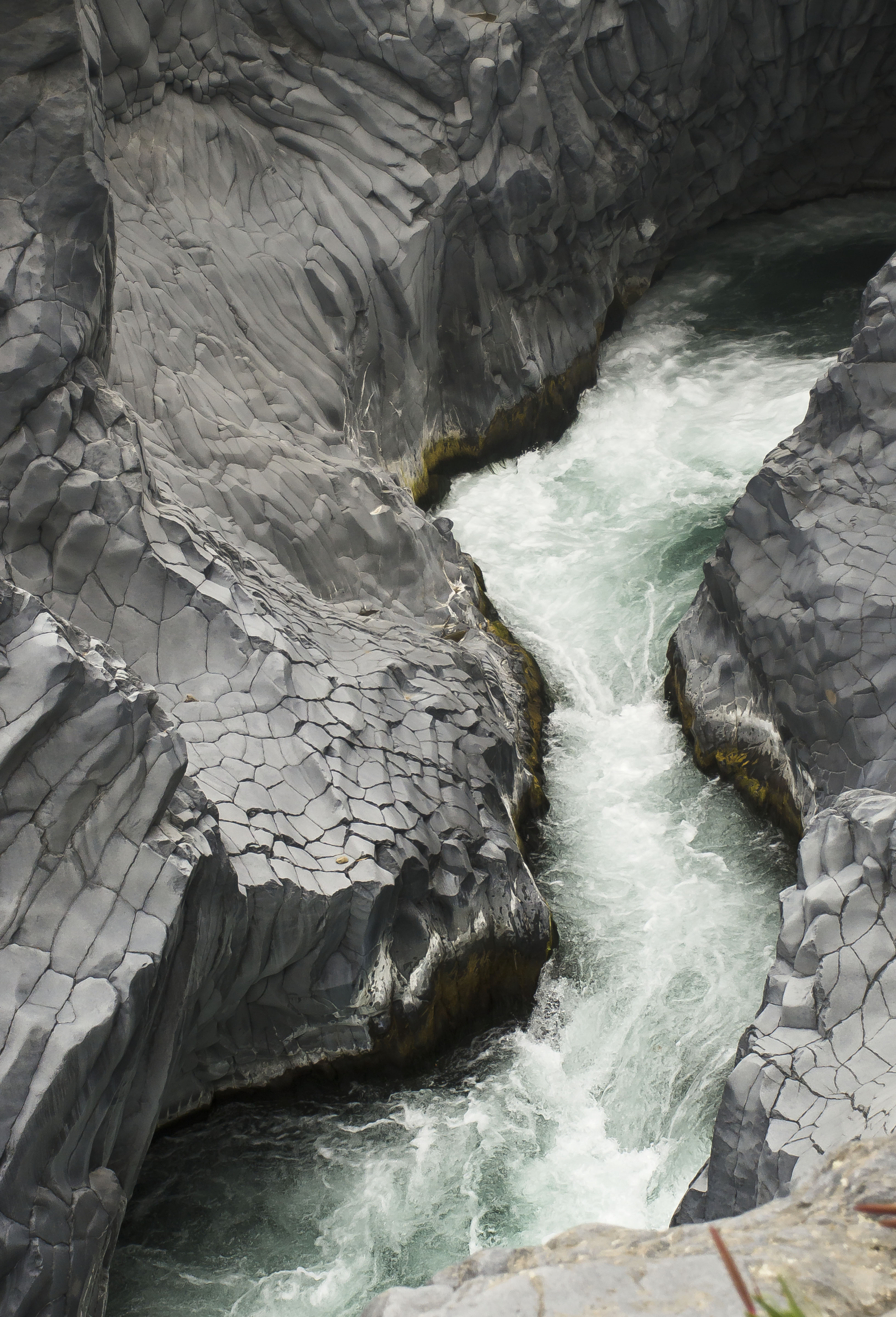 Gole dell'Alcantara, near Francavilla di Sicilia